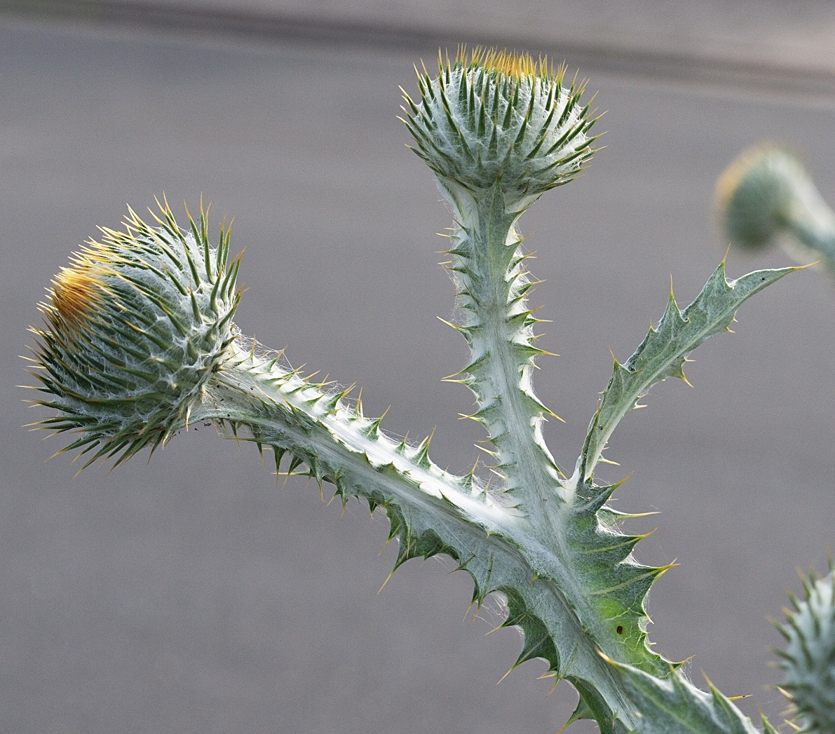 Onopordum acanthium (Eselsdistel). Standort Fürth. Detail Blütenknospen